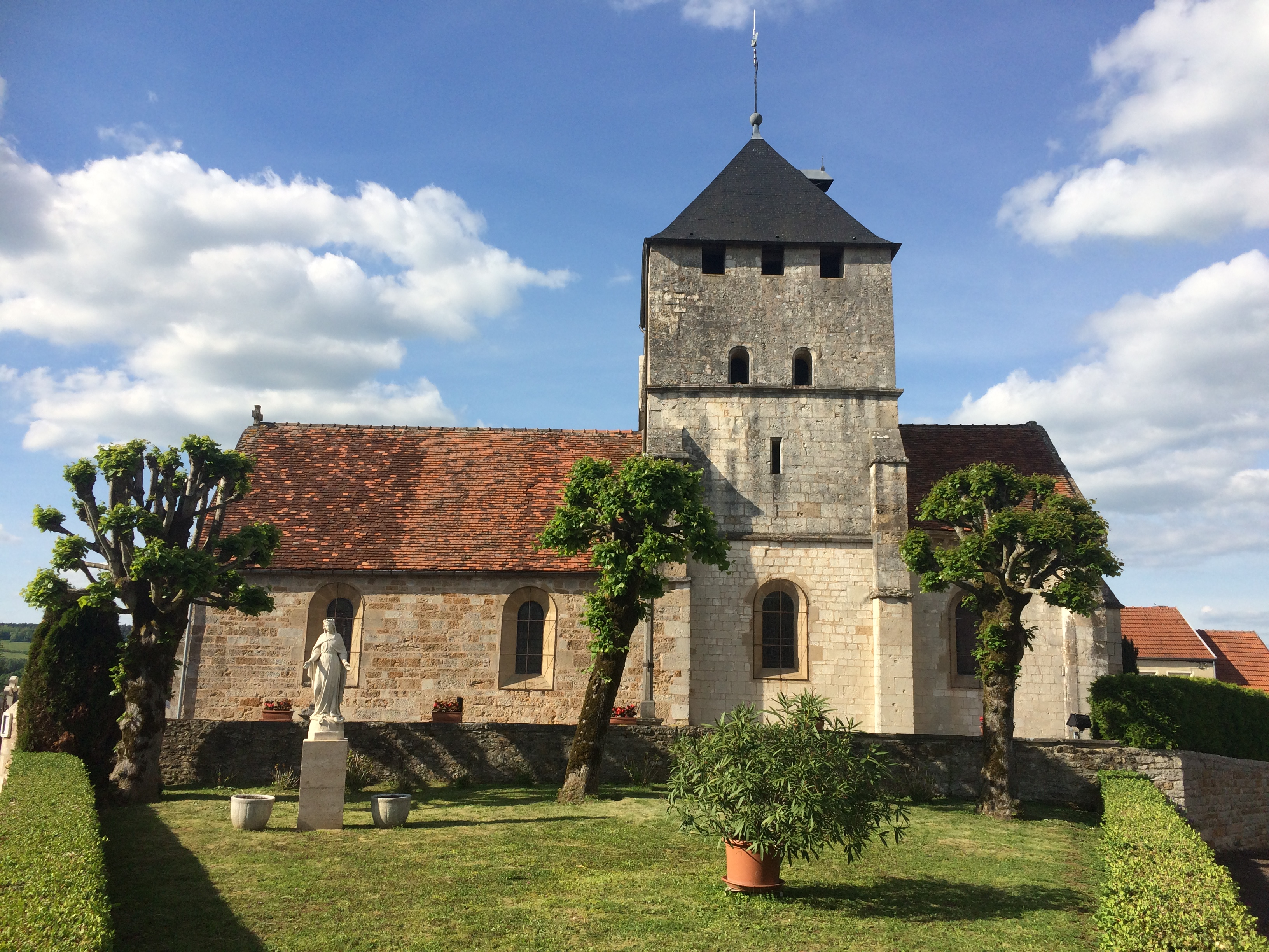 Eglise Saint-Sébastien de Champigny-lès-Langres.